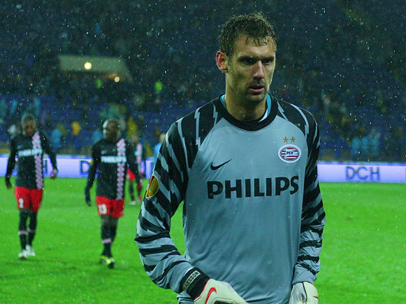 Андреас Иссаксон